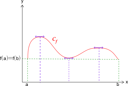 Illustrations du théorème de Rolle